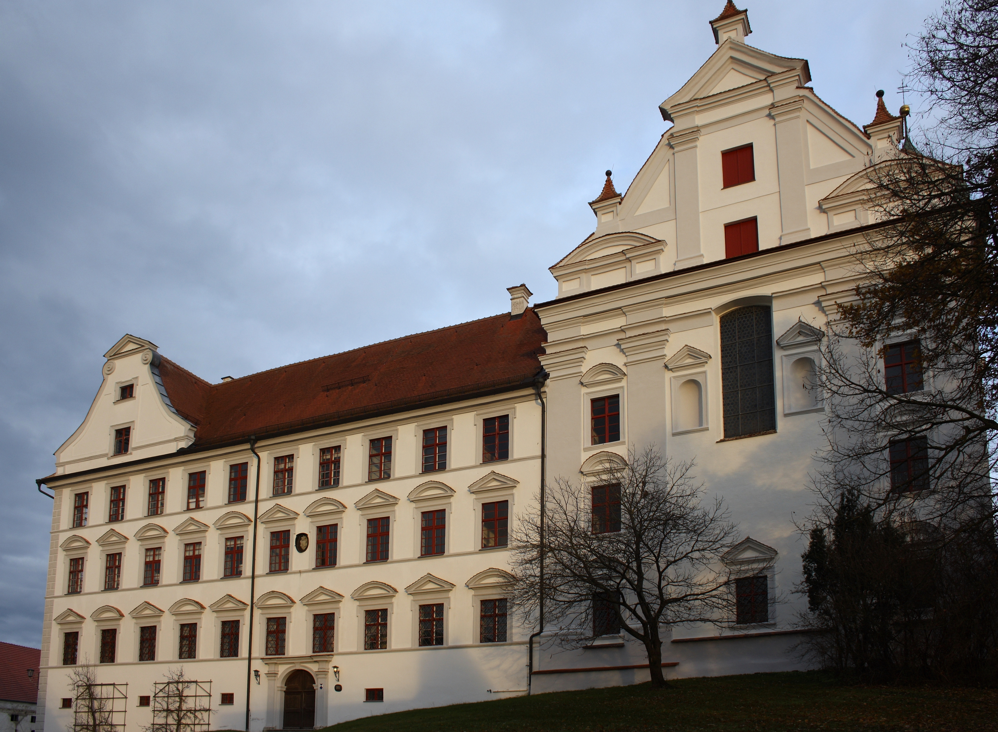 Ehemaliges Damenstift in Edelstetten in der Gemeinde Neuburg an der Kammel im Landkreis Günzburg (Bayern), Westfassade des Klosters und der katholischen Pfarrkirche St. Johannes Baptist und Johannes Evangelist